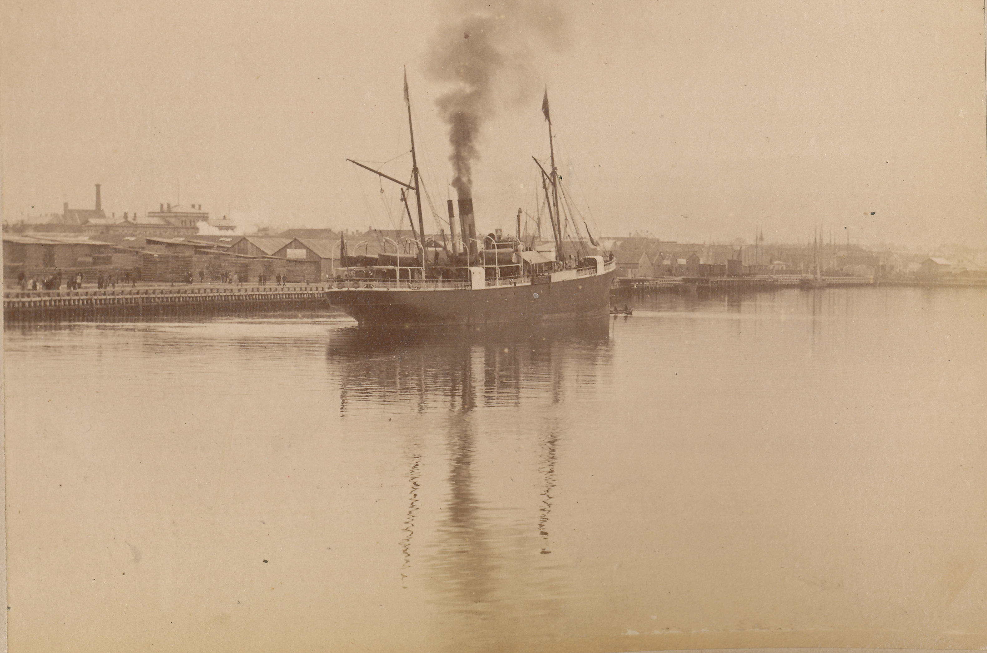 Format: Fotopositiv Dato / Date: 1893 Fotograf / Photographer: Jørgen Wickstrøm Sted / Place: Trondheim Eier / Owner Institution: Trondheim byarkiv, The Municipal Archives of Trondheim Lenke / Link: Se diskusjonen rundt de to fotografene Johan Erik Wickstrøm og Jørgen Johan Brock Wickstrøm (Preus Museum) Litteratur: Trondhjemske Samlinger: 1893 - et år i Trondhjem. Bilder av Jørgen Wickstrøm (Trondheim 2001) Arkivreferanse / Archive reference: Tor.H40.B24.F1599 [T0013] Merknad: Wilsonlinjens "Juno" fotografert fra den ytre moloen i havnebassenget utenfor østre del av Brattøra. John West Wilson (1816 - 1889) var sønn av grunnlegeren av det store Wilsonrederiet som etter hvert spesialiserte seg på å frakte emigranter fra Nord-Europa over til Hull i England. Vel framme i Hull dro emigrantene oftest videre over land via tog til Liverpool, hvor de så fikk seg plass på de større trans-atlantiske emigrasjonsskipene.